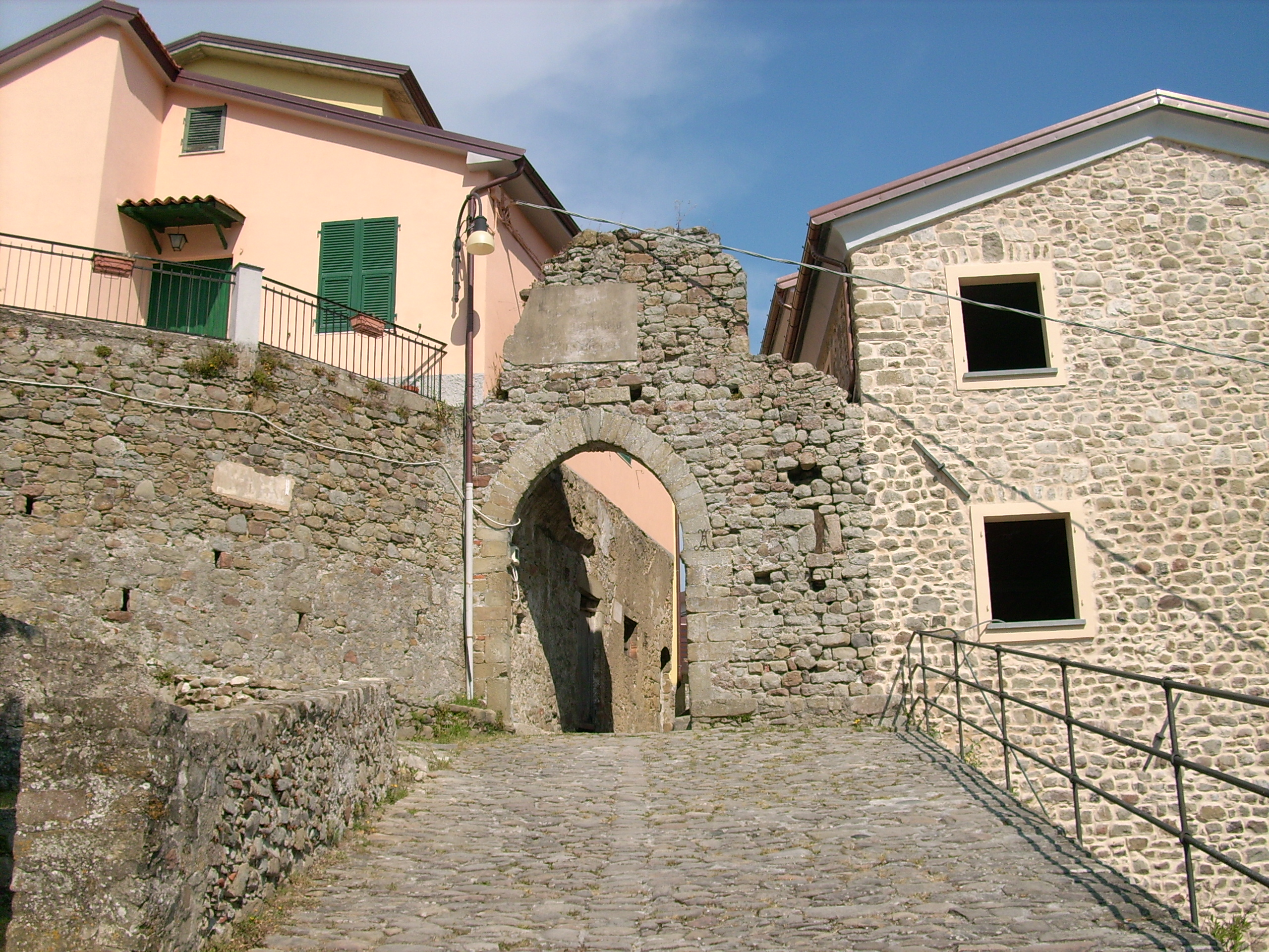 Centro storico di Beverino Castello, Liguria, Italia